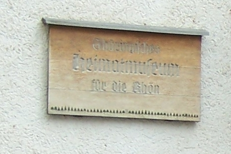 Dermbach